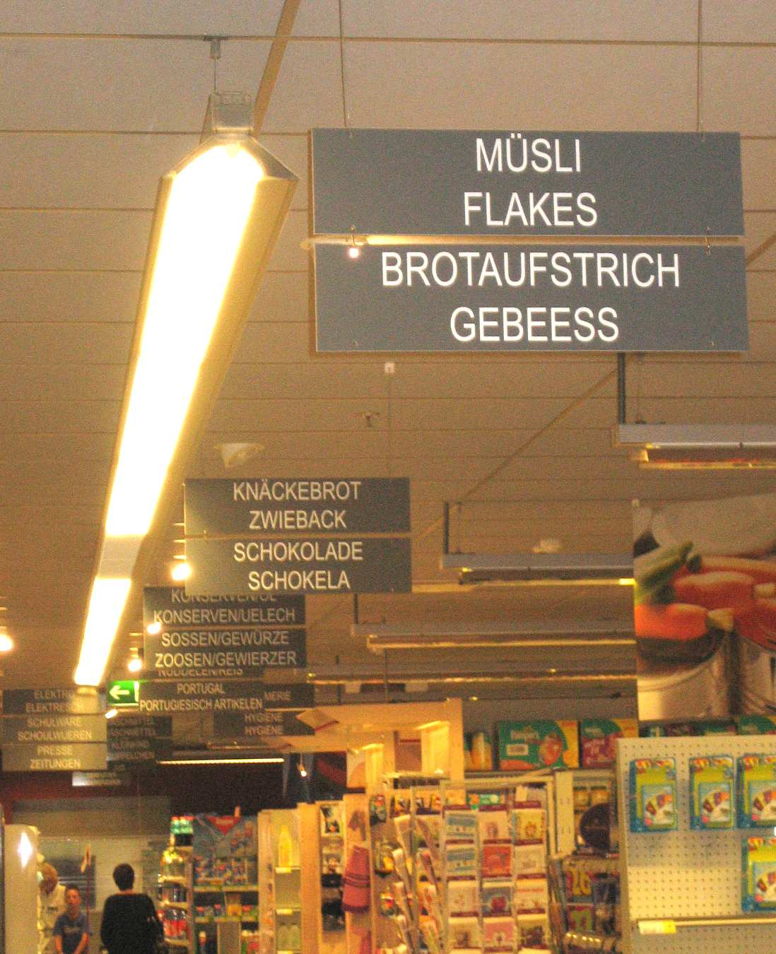 Méisproocheg Rayons-Schëlter an engem Supermarhé zu Iechternach.